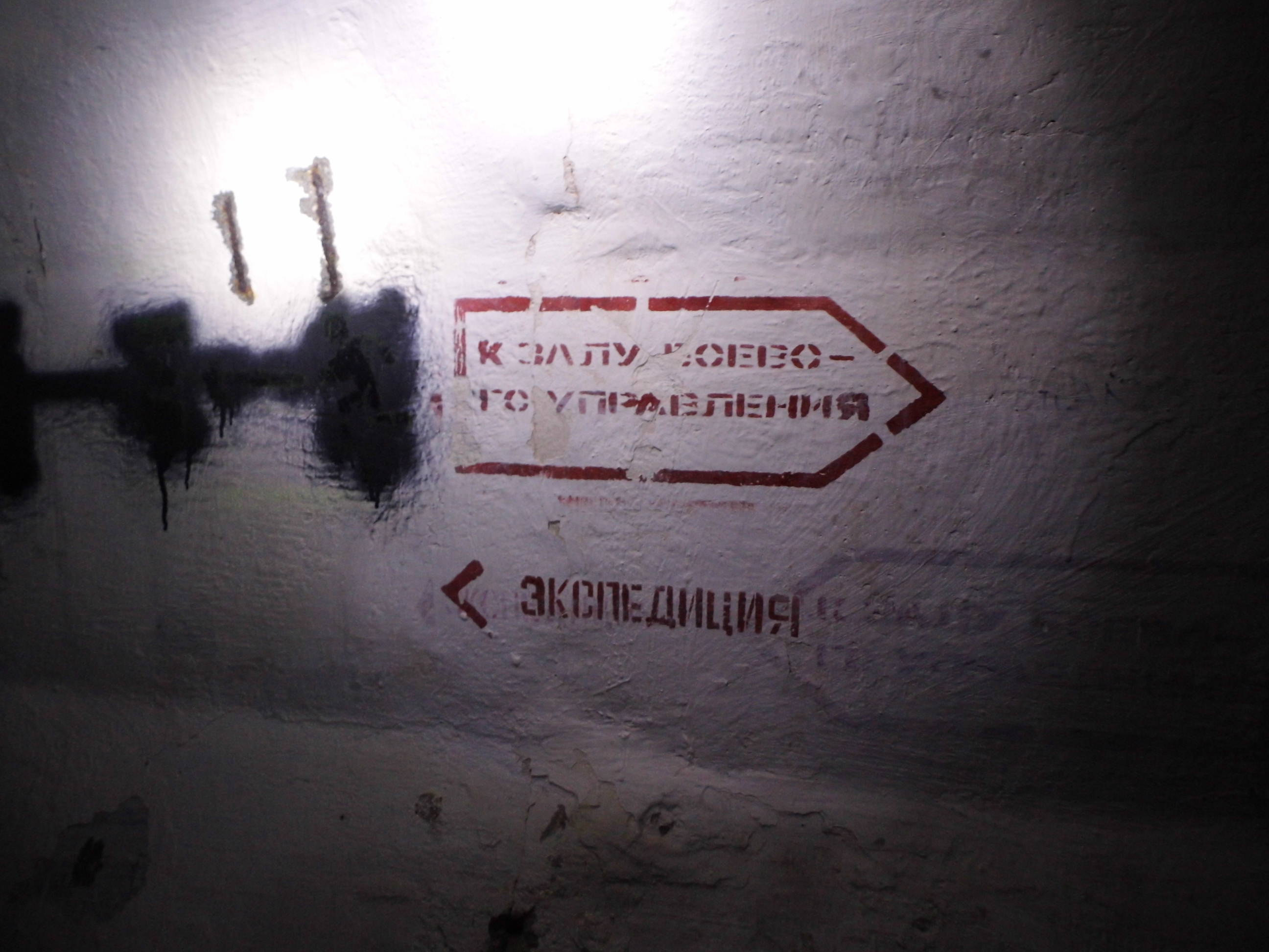 Oznaczenia w korytarzu głównym Zapasowego Stanowiska Dowodzenia Zachodniego Teatru Działań Wojennych w Wilkocinie.